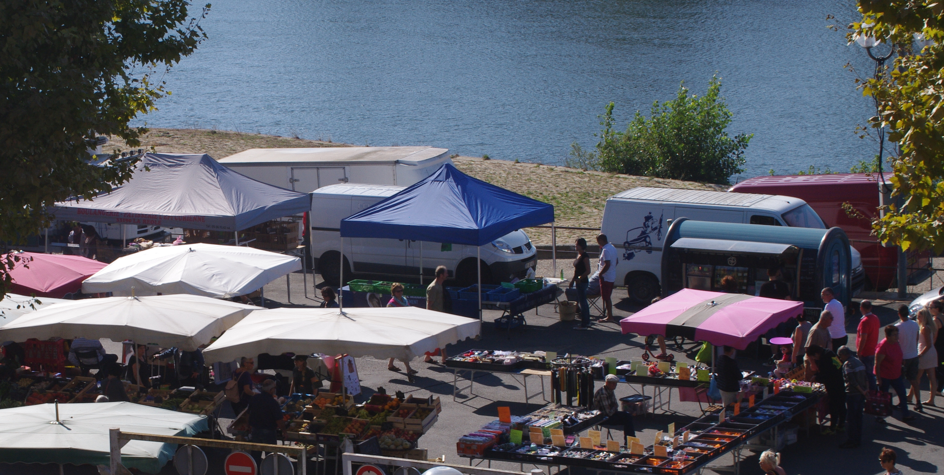 Marché de La Réole